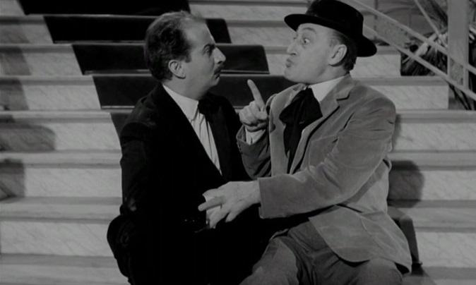 Louis de Funès e Totò in una scena del film Totò (1959)